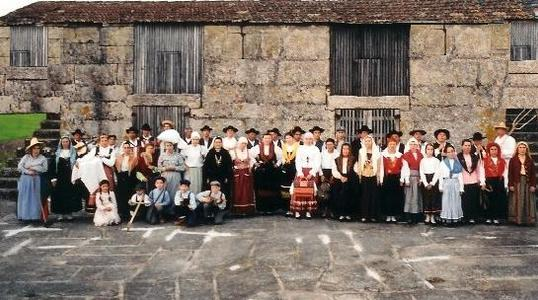 Foto do Rancho Folclórico de Santa Maria de Maureles